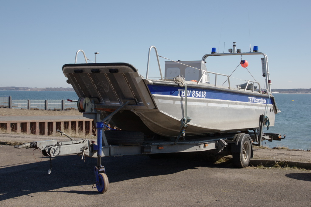 FinJet Faster650